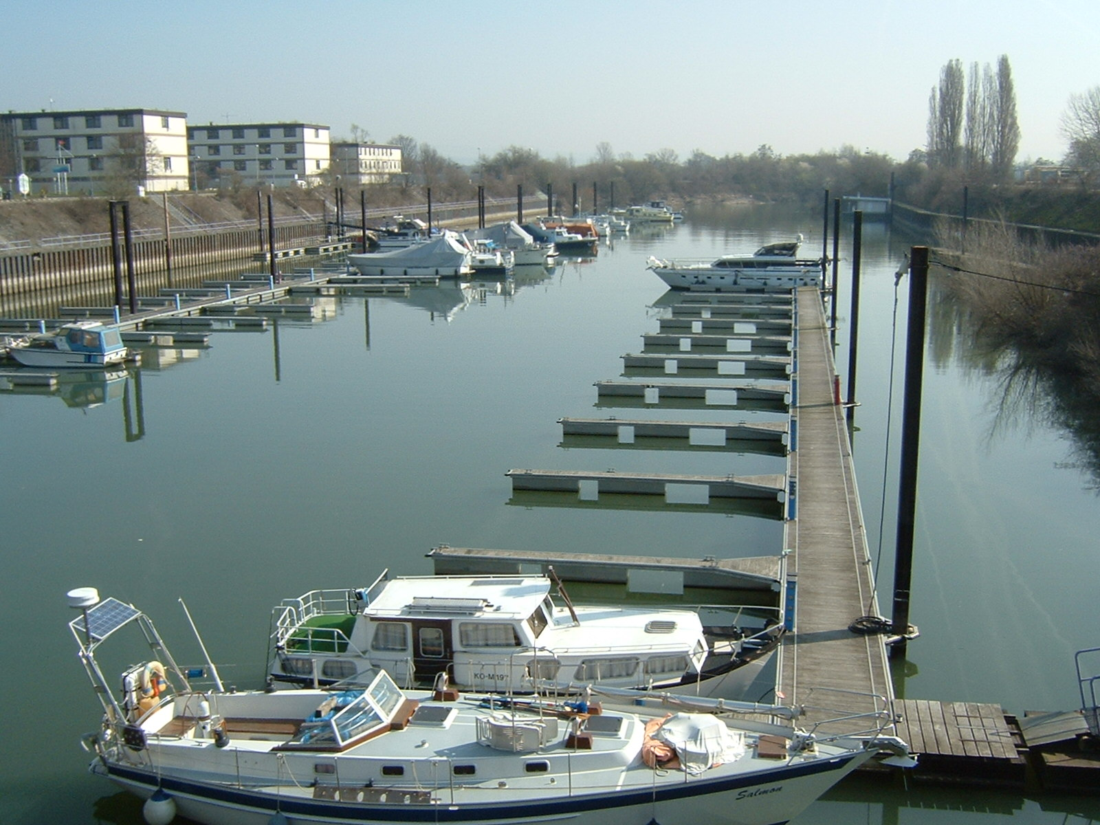 Yachthafen Neuwied